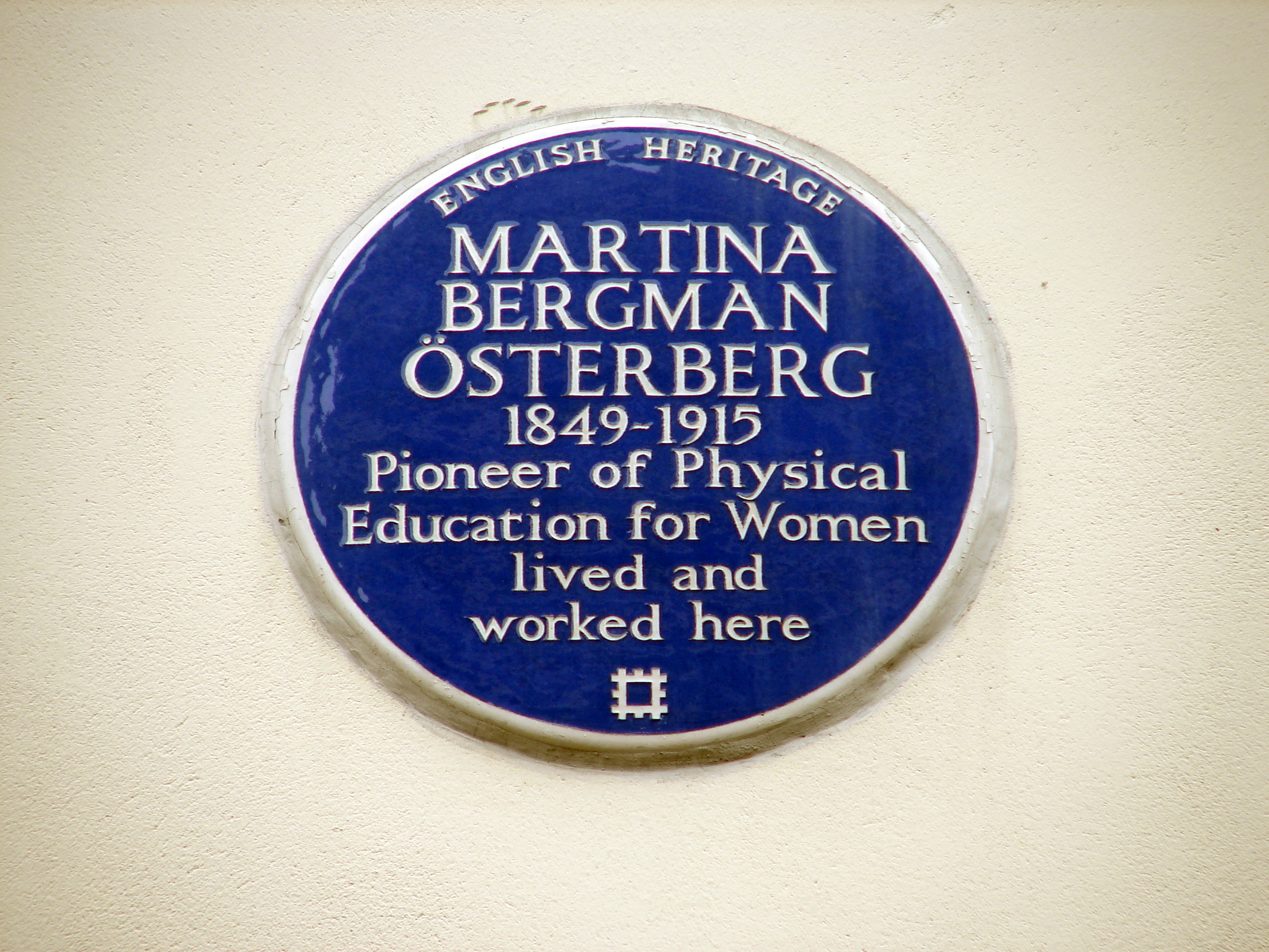 Martina Bergman Osterberg